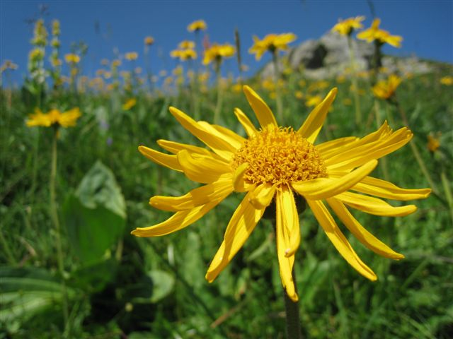 Thierry Leroy